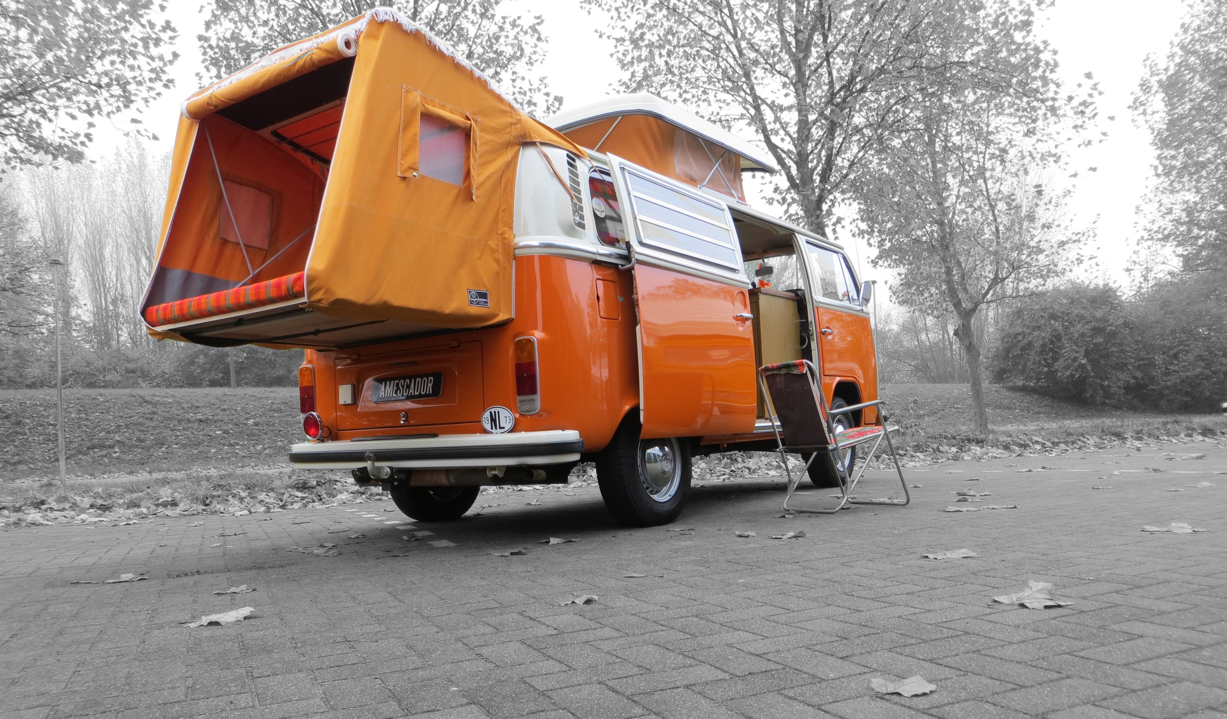 Amescador kampeerauto met bedstede tent